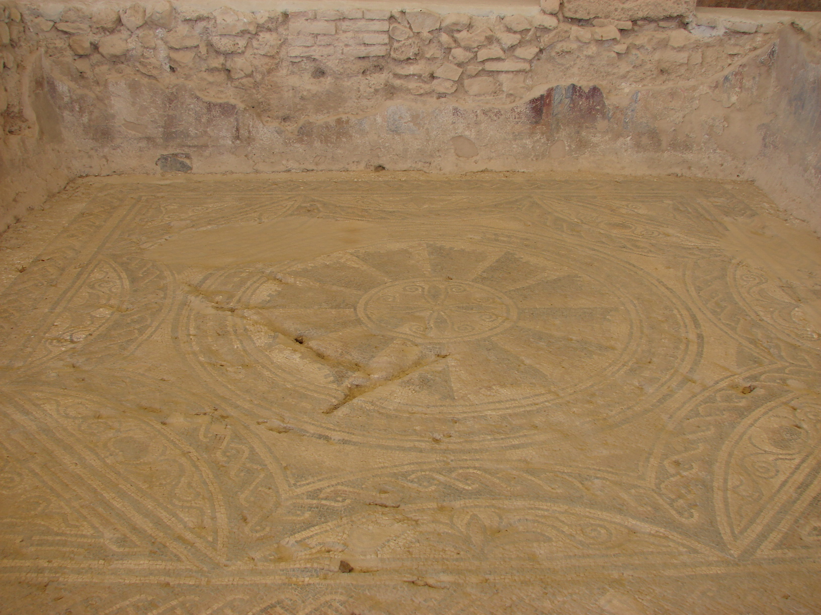 Villa romana de El Ruedo, Almedinilla (España).